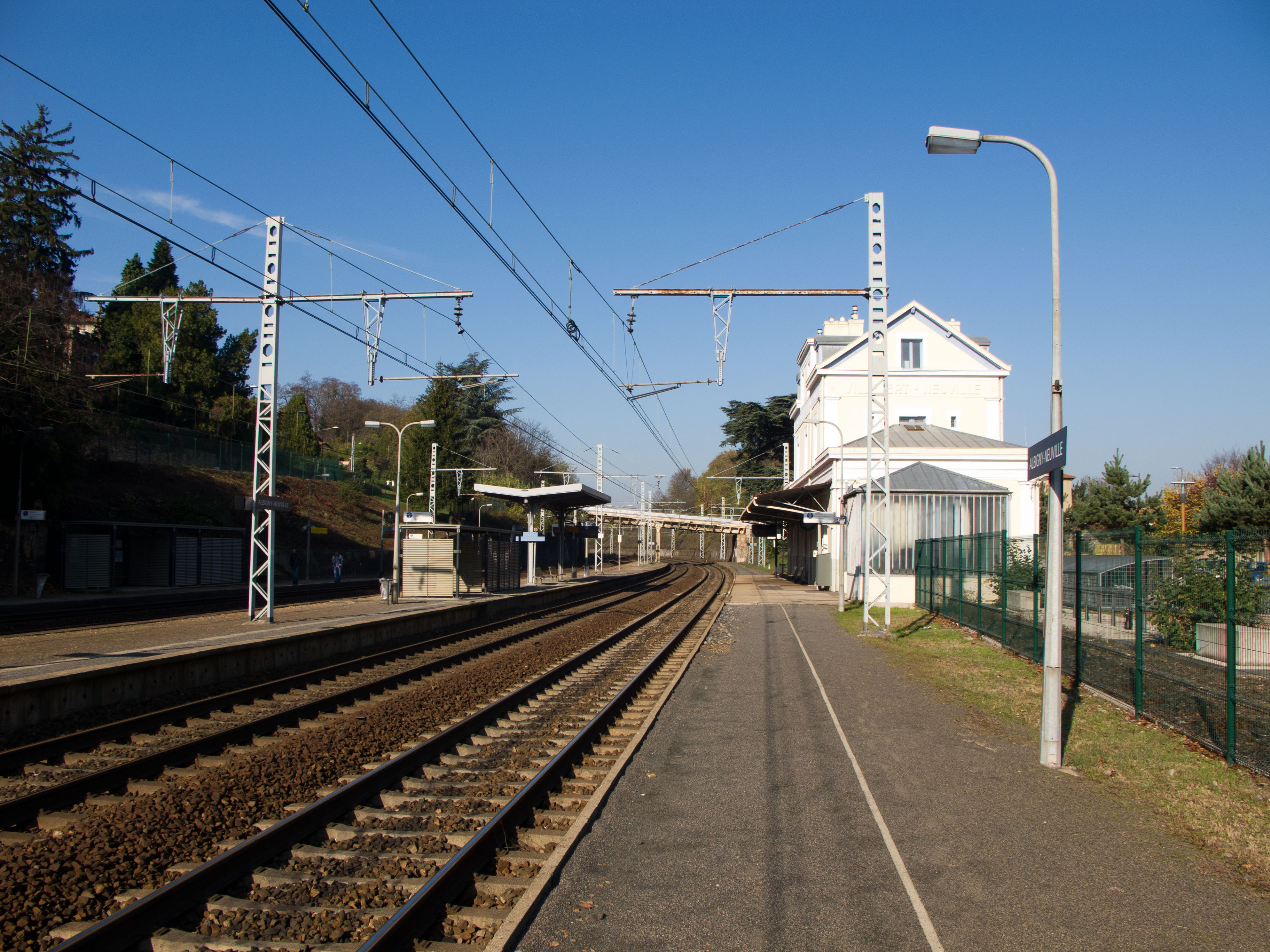 Gare d'Albigny-Neuville, Albigny-sur-Saone, France